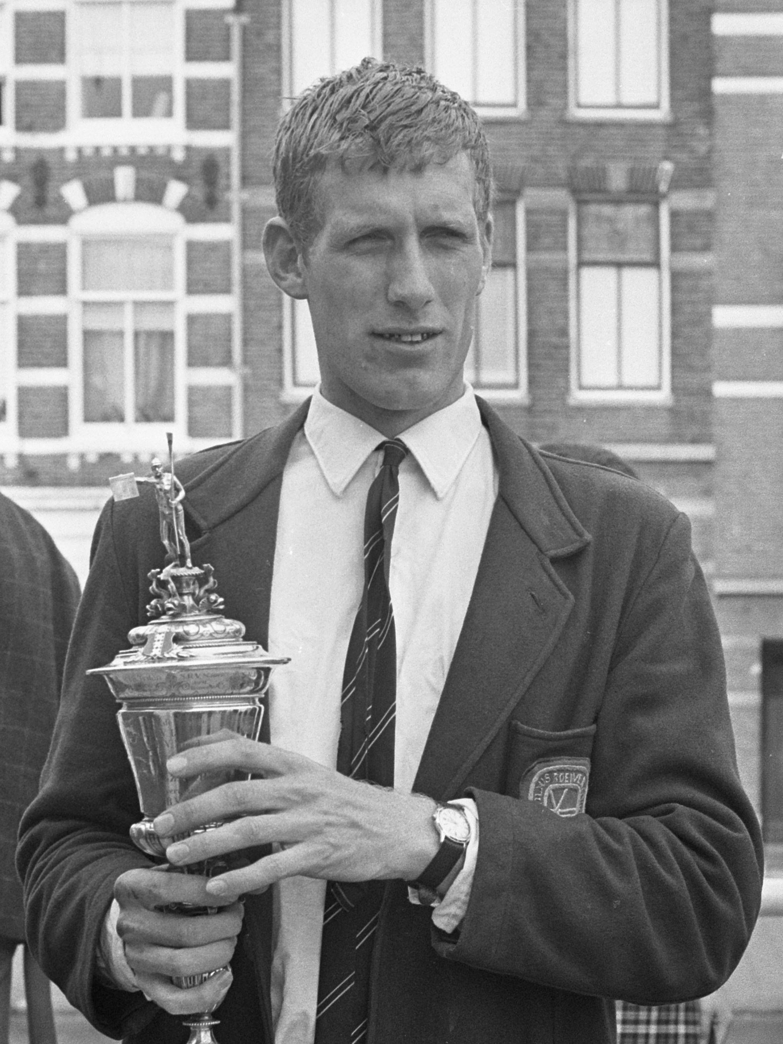 Lange Afstand Skifwedstrijd op Amstel. Harry Droog met Telegraafbeker 21 april 1968